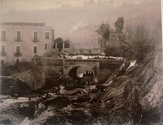 "Ferrovia Cumana Napoli-Pozzuoli Torre Gaveta, Galleria artificiale Farina sul Corso Vittorio Emanuele - Fermata".